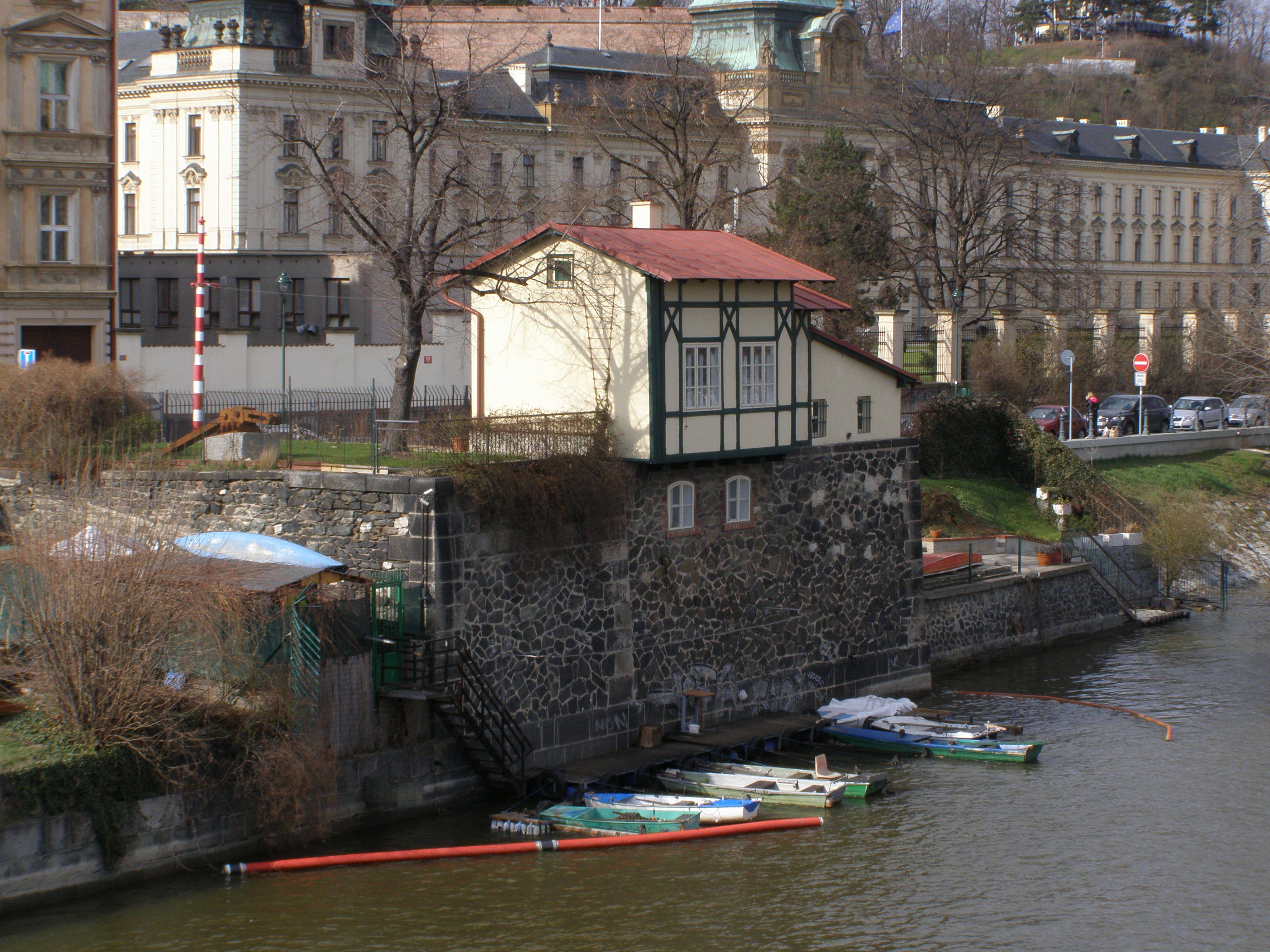 Praha, Malá Strana, pohled z Mánesova mostu na místo, odkud vycházela Rudolfova lávka a bývalá mýtnice